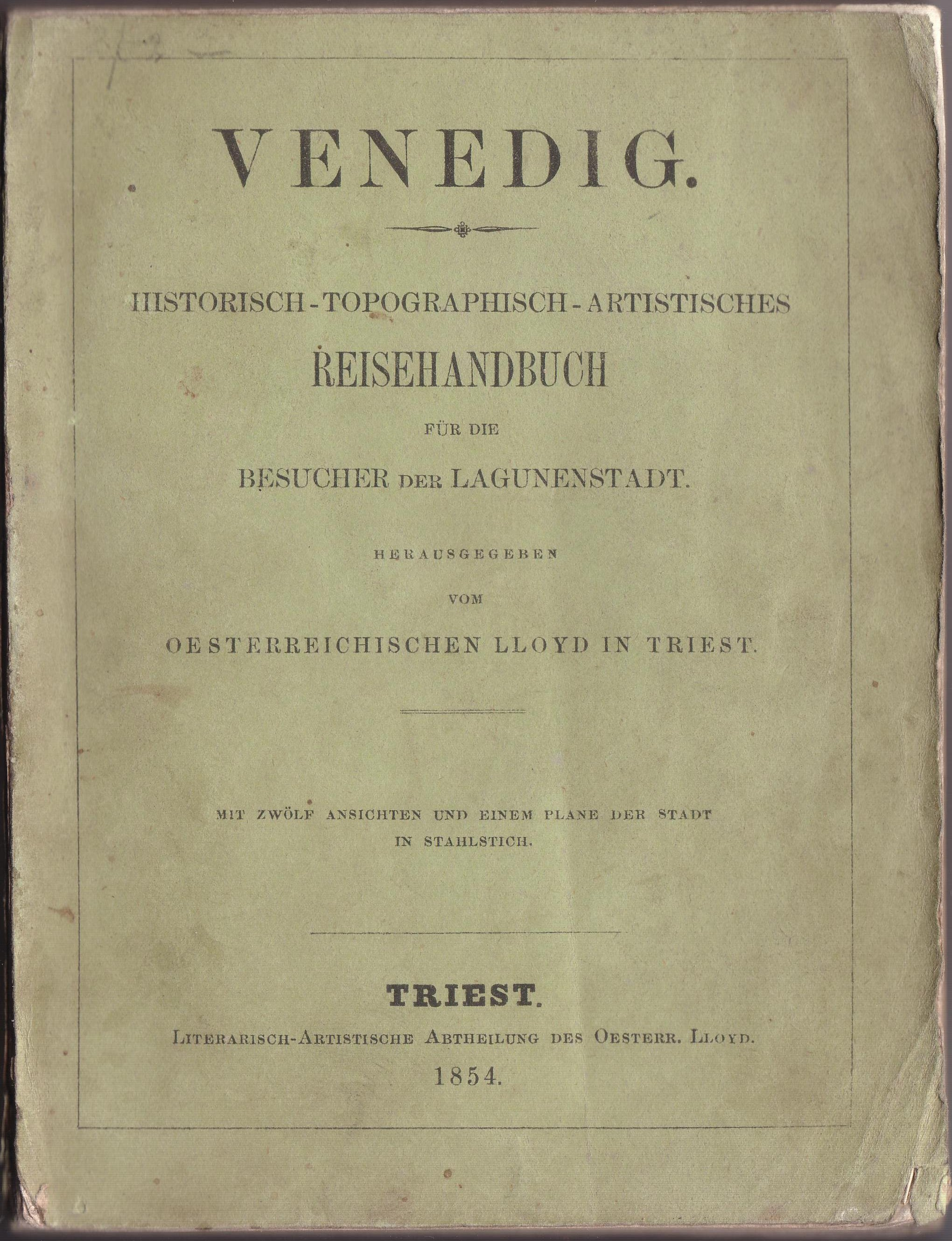 LLoyd's Venedig, 1854